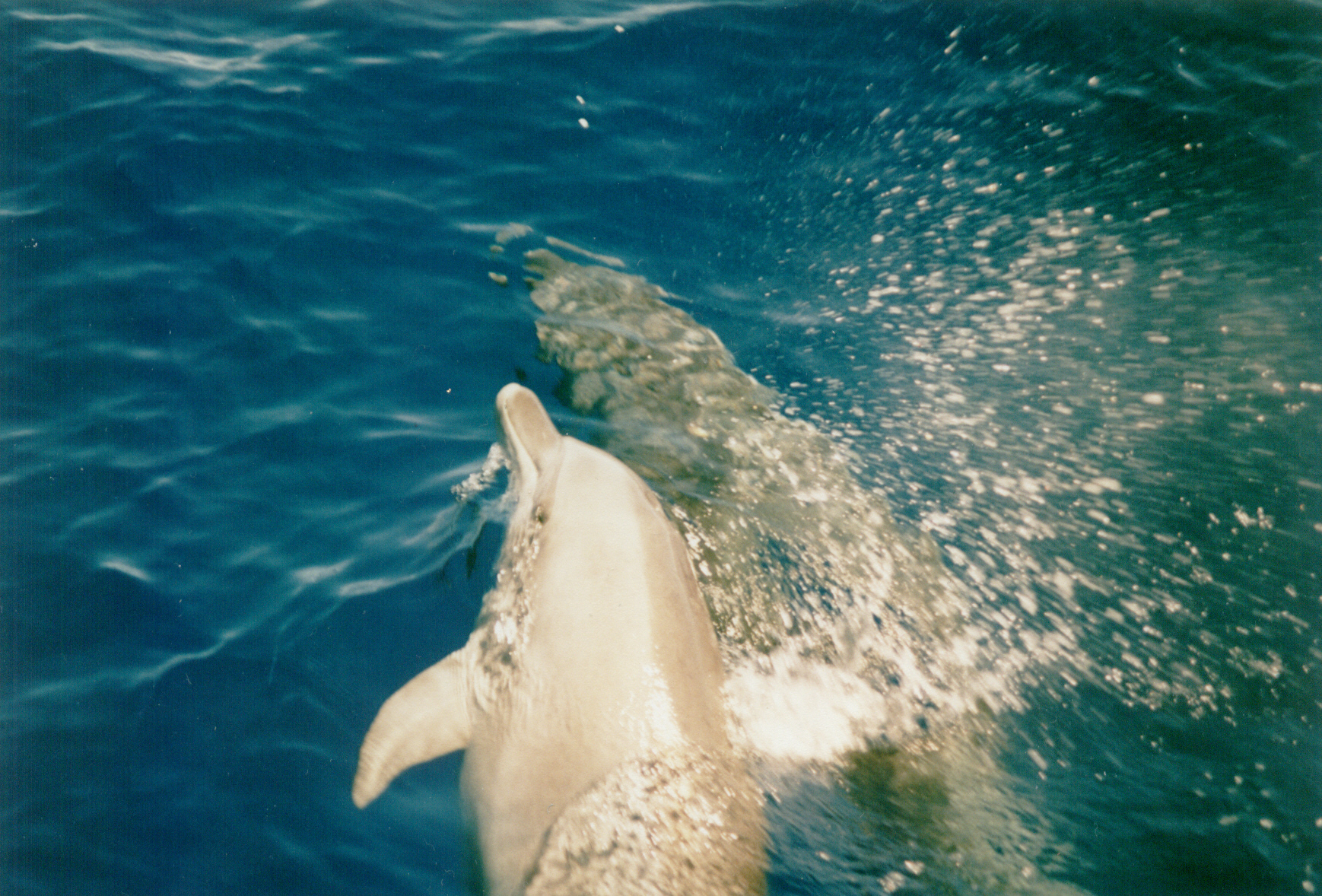 Delphine vor der Küste Australiens, Indopazifische Große Tümmler, Tursiops aduncus Andere Versionen